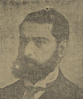 Carlos Ortí Muñoz